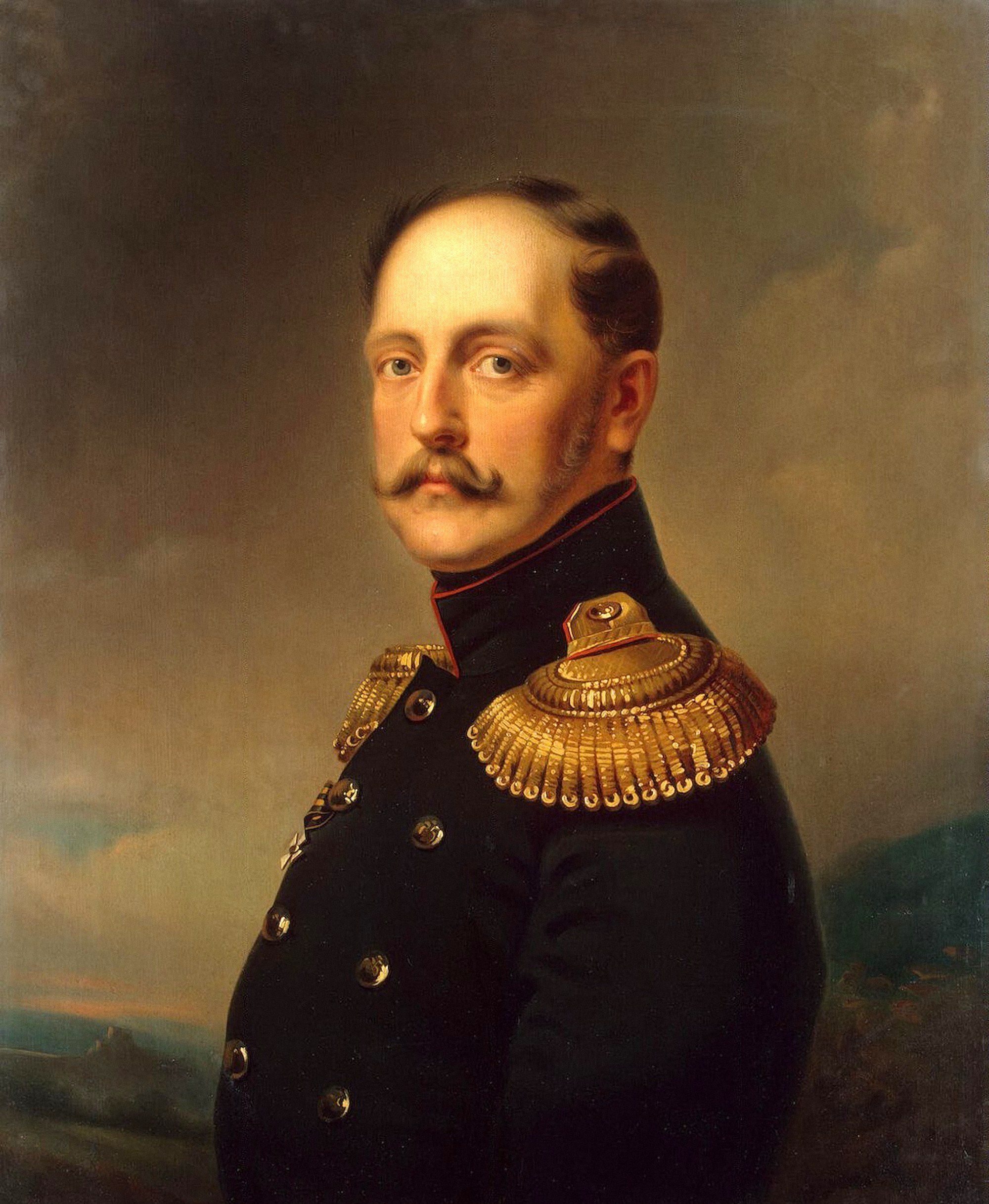 Портрет императора Николая I